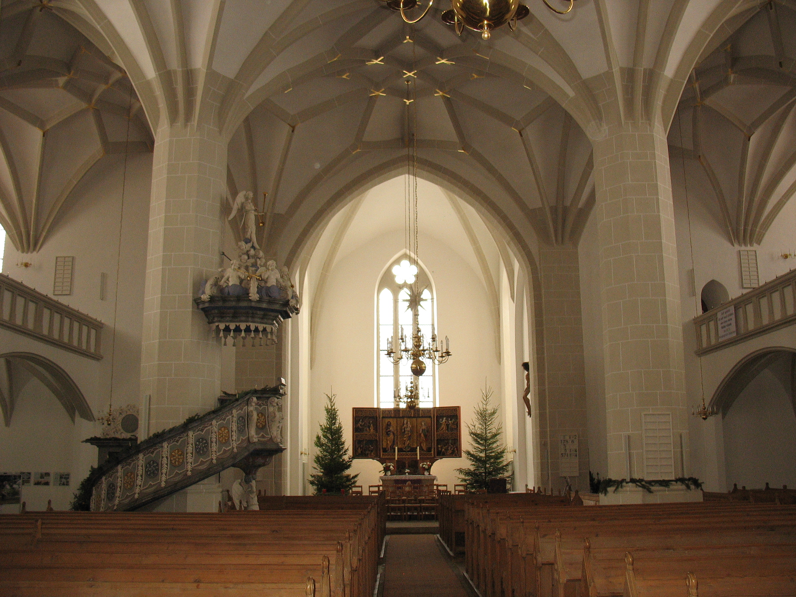 Plauen, St. Johanniskirche Innenansicht mit Altar und Kanzel